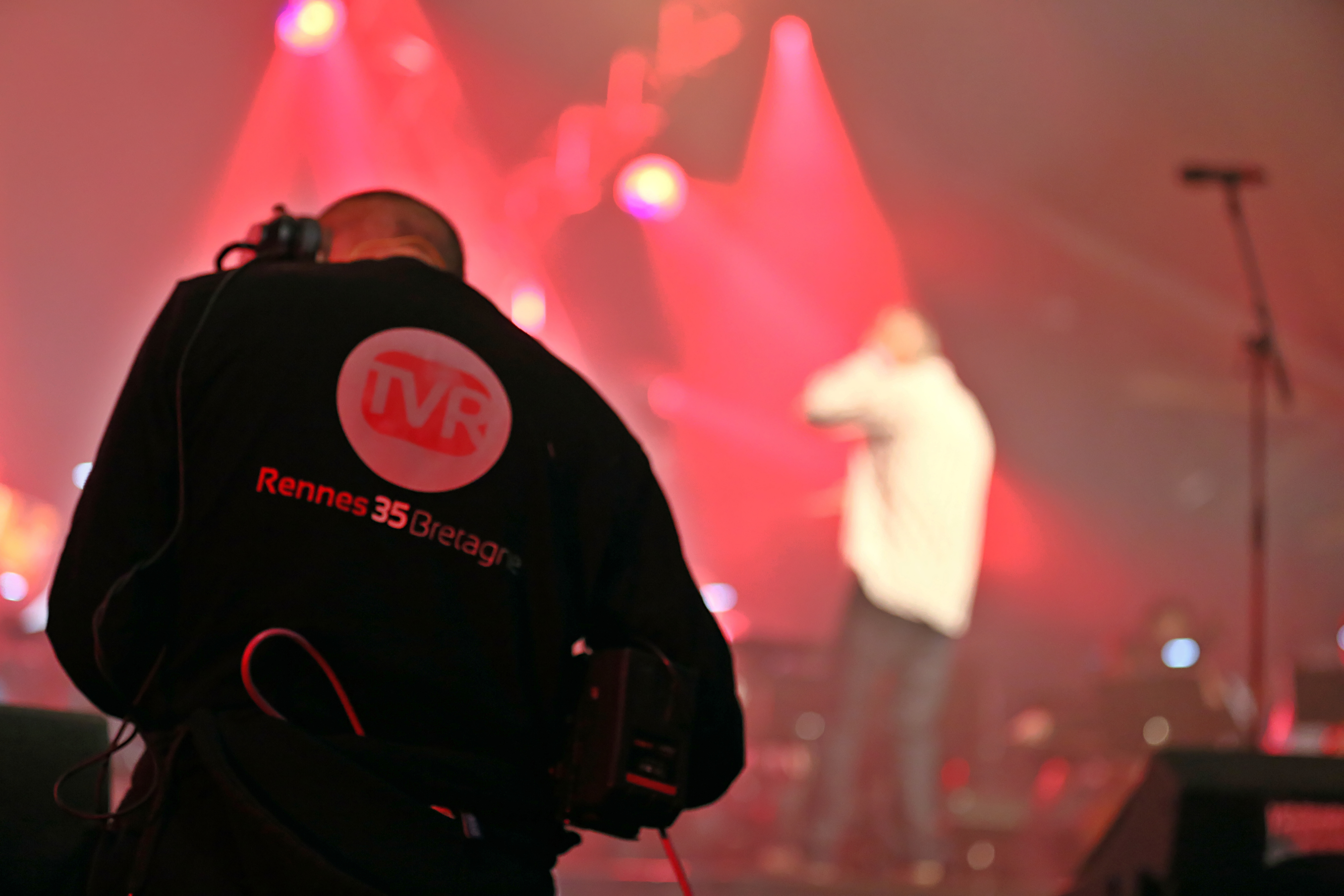 Création Alkeemia avec le groupe Digresk et l’orchestre symphonique des Deux Mondes dirigé par Philippe Hui lors du festival Yaouank le 21 novembre 2015 au Parc des Expositions de Rennes.